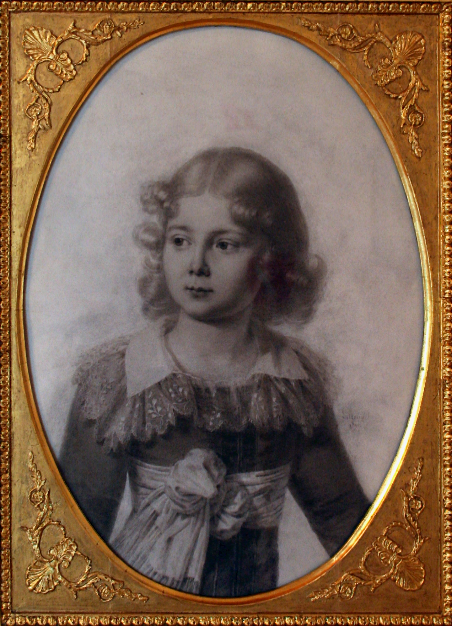 Portrait of Zygmunt Krasiński (1812-1859)